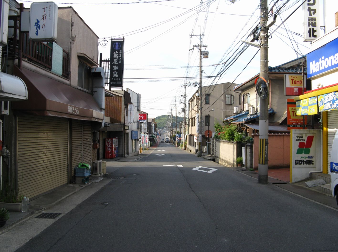 京都市道185号勧修寺日ノ岡線 山科区川田菱尾田付近にて南望